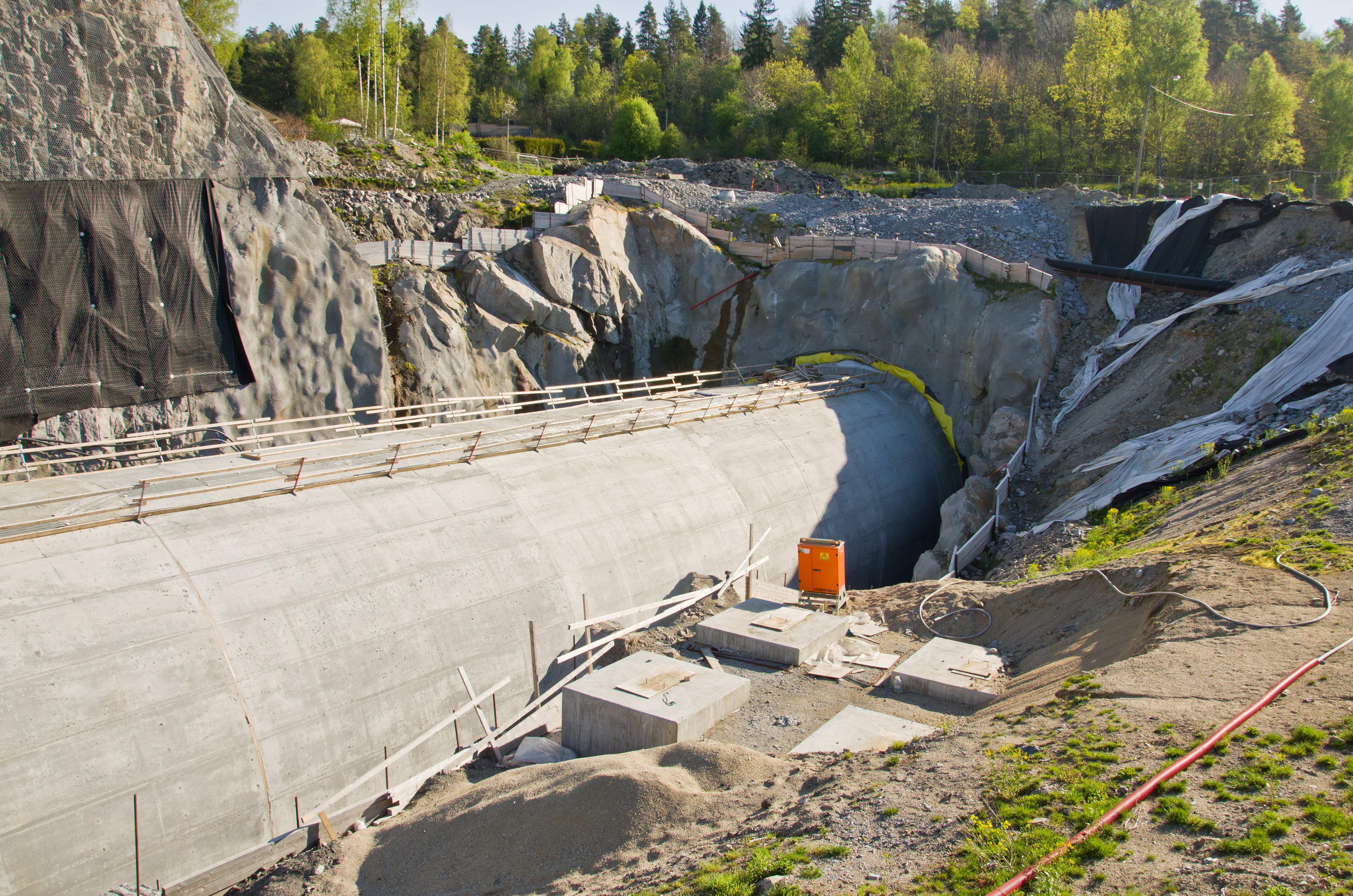 Storberget tunnel, vestre innslag, april 2014. Porsgrunn, Telemark, Norge